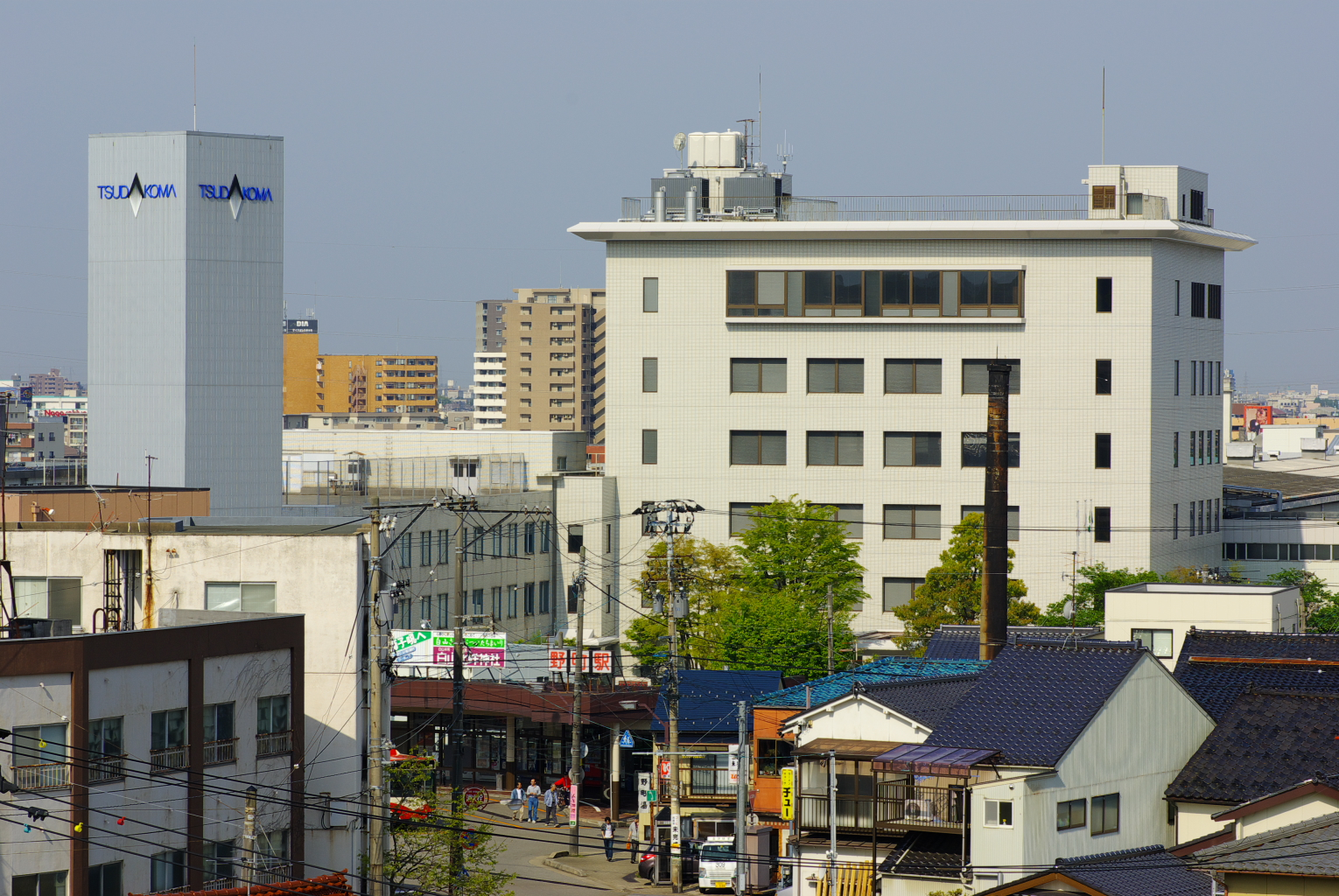 津田駒工業本社と野町駅前界隈